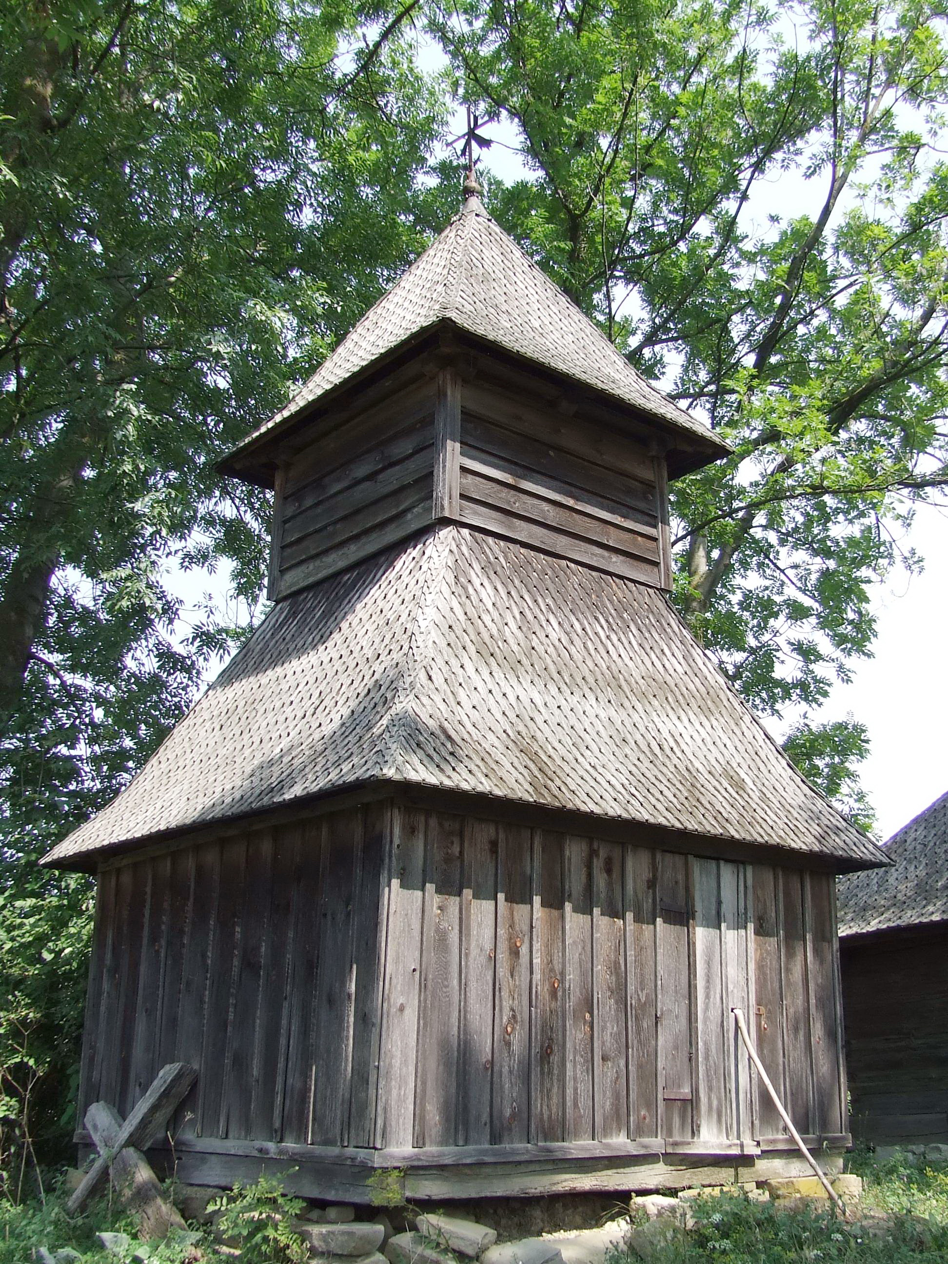 Biserica de lemn din Deag, cu hramul Sf. Arhangheli, judeţul Mureş.